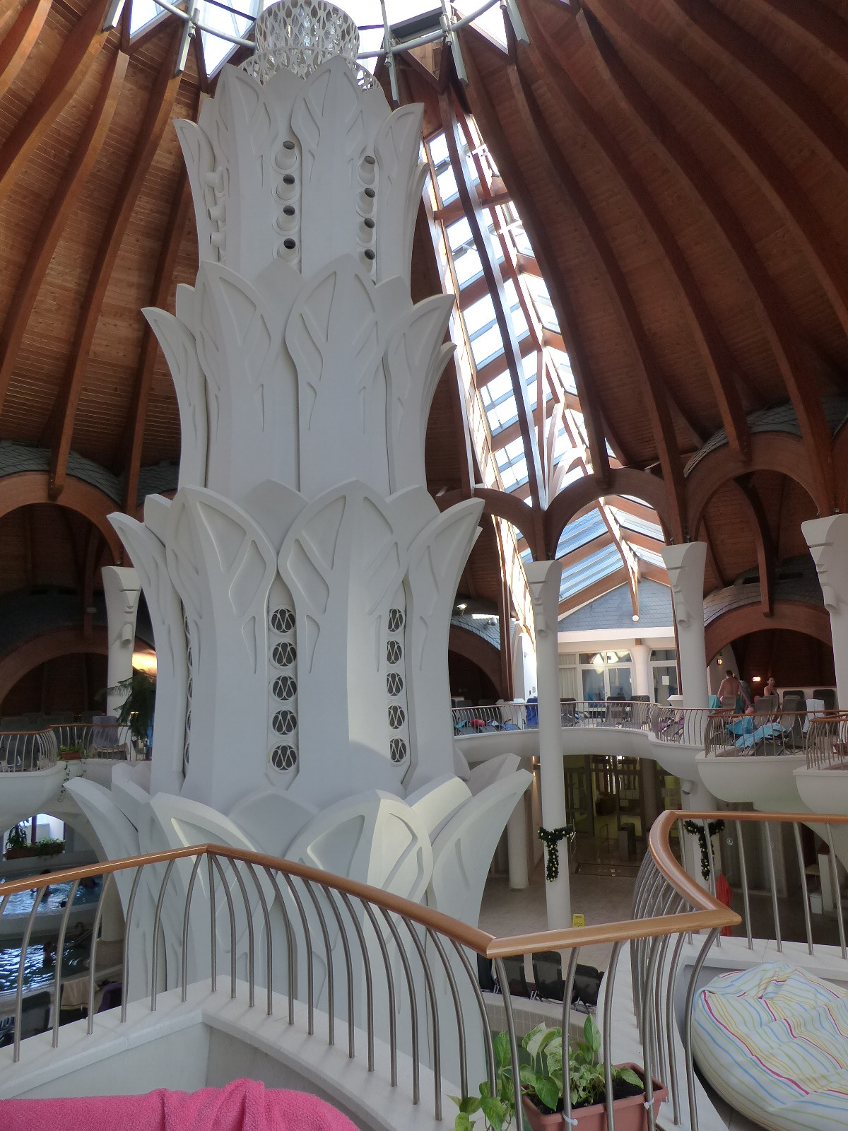 Hagymatikum. Világfa. A felvétel 2017. december 26-án készült a Hagymatikumban, Makón.